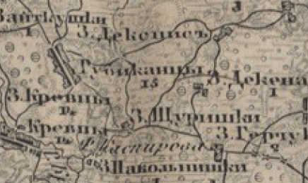 1863 karinio topografinio žemėlapio fragmentas, kuriame pažymėtas Ščiūriškio užusienis